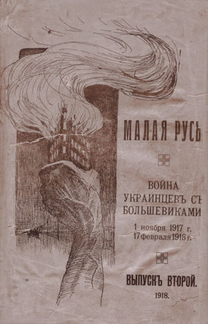 Второй выпуск оказался тематическим и был посвящён жертвам большевиков в Киеве (тематическое название этого сборника: «Война украинцев с большевиками: 1 ноября 1917 — 17 февраля 1918»). В нём также были опубликованы воспоминания секретаря Шульгина Дарьи Васильевны Данилевской о пережитой ею ночи накануне захвата города большевиками